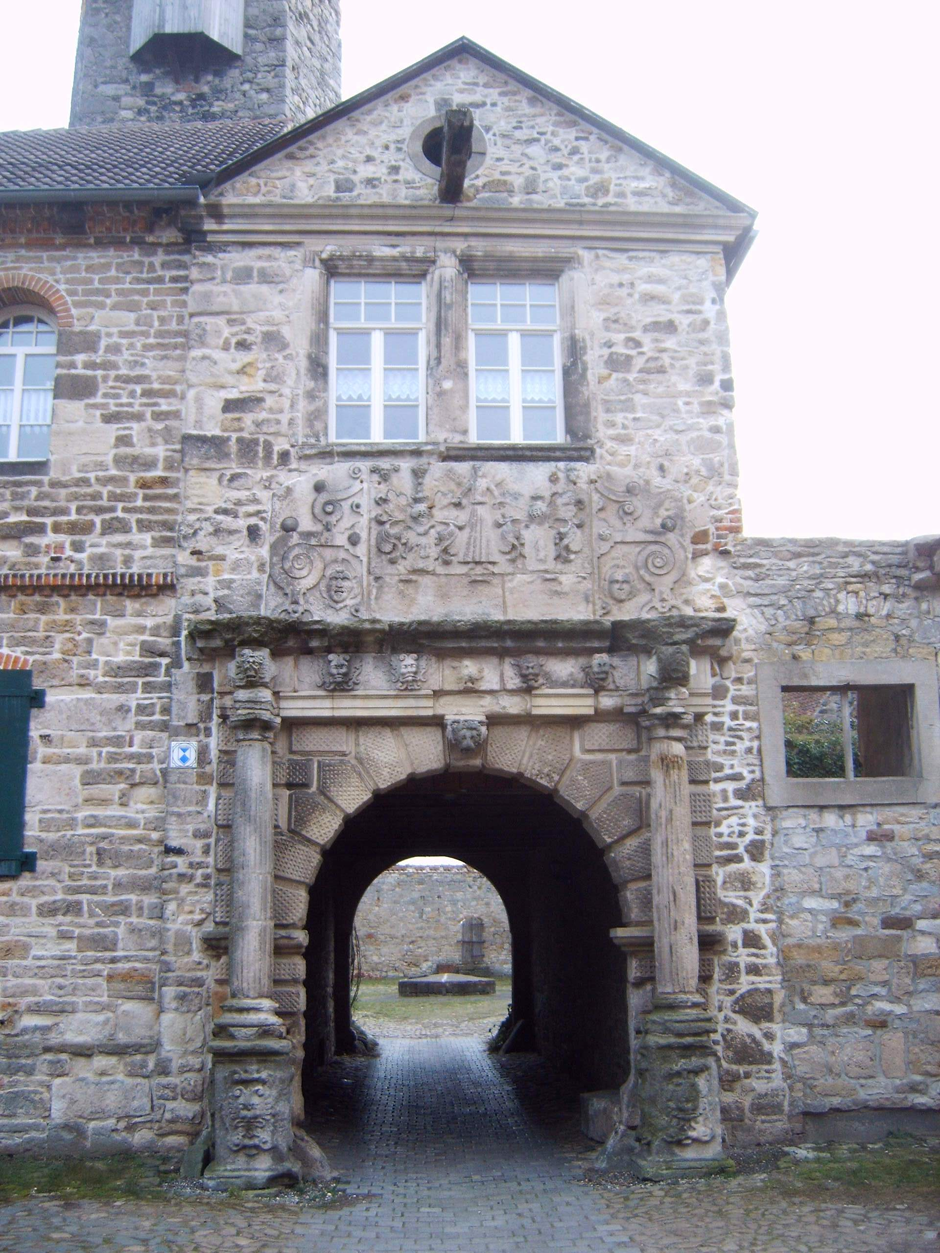 Schloss Ampfuth, Tor innerhalb des Schlosses